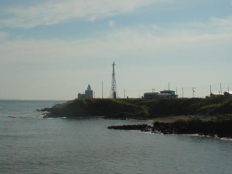 Nosappu Cape Lighthouse, Nemuro, Hokkaido 納沙布岬灯台（2005年10月10日 nnh撮影）